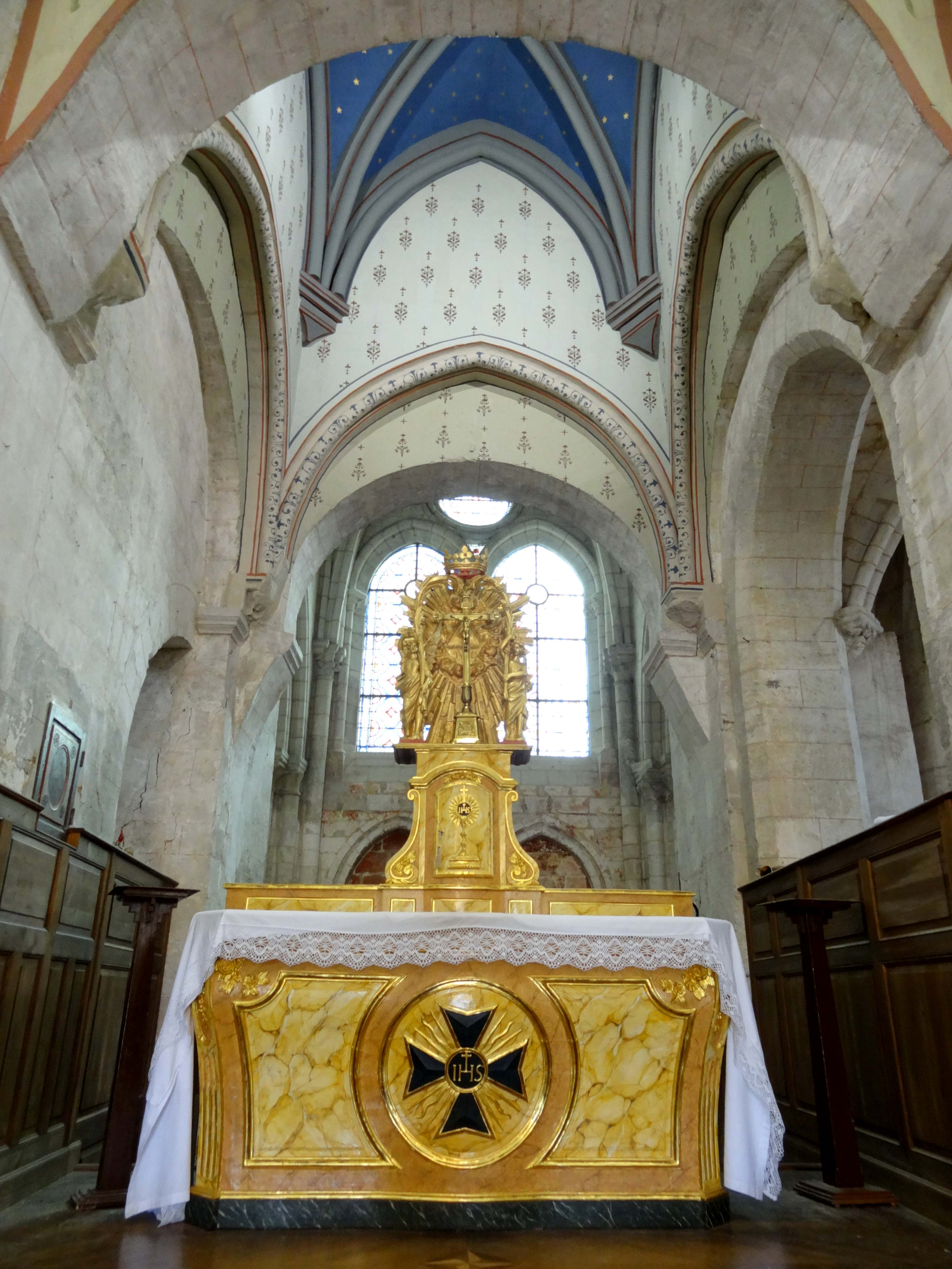 Mobilier de l'église - voir titre.